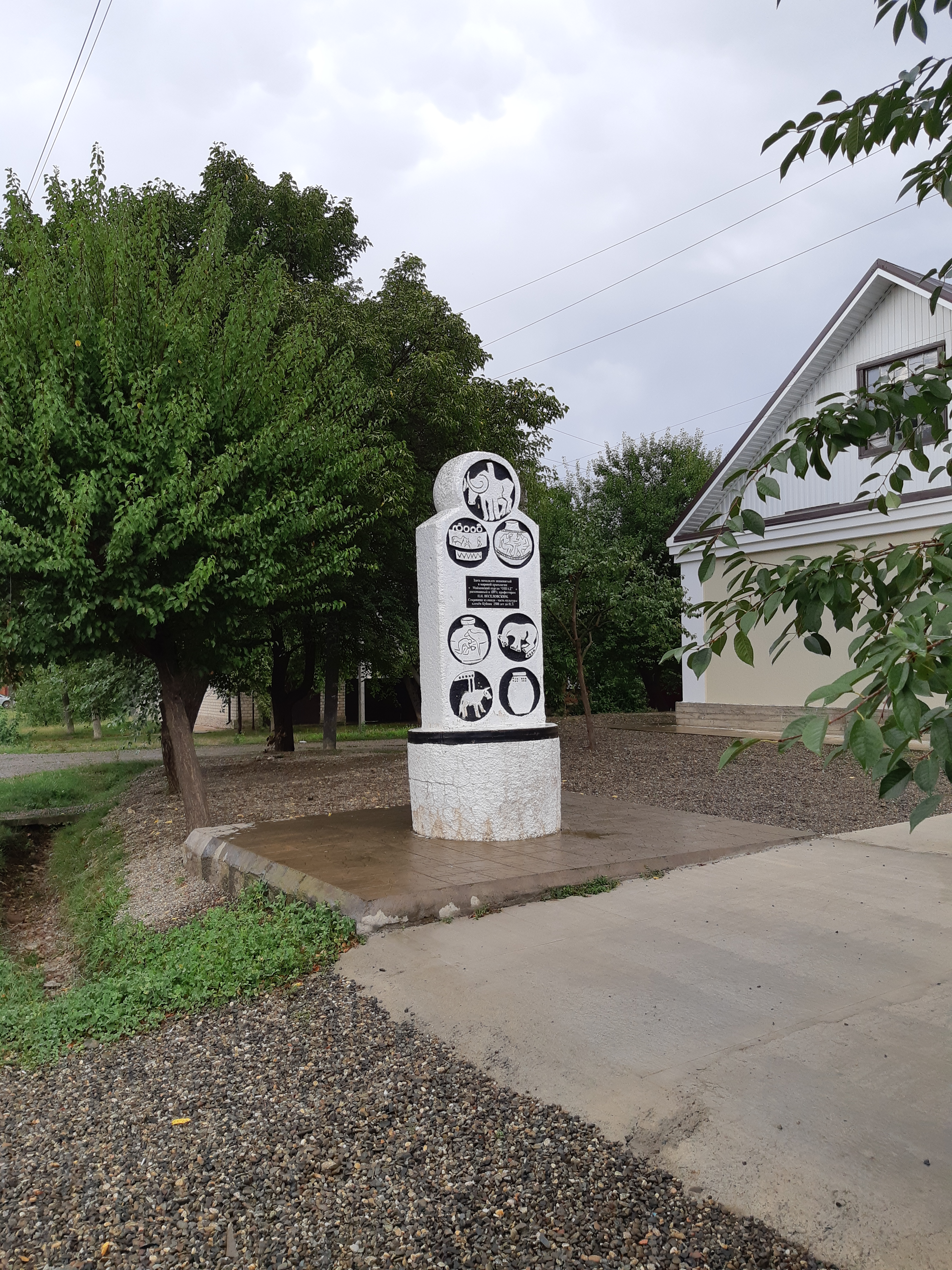 Майкопский курган: угол улиц Курганной и Подгорной,, Майкоп, Адыгея